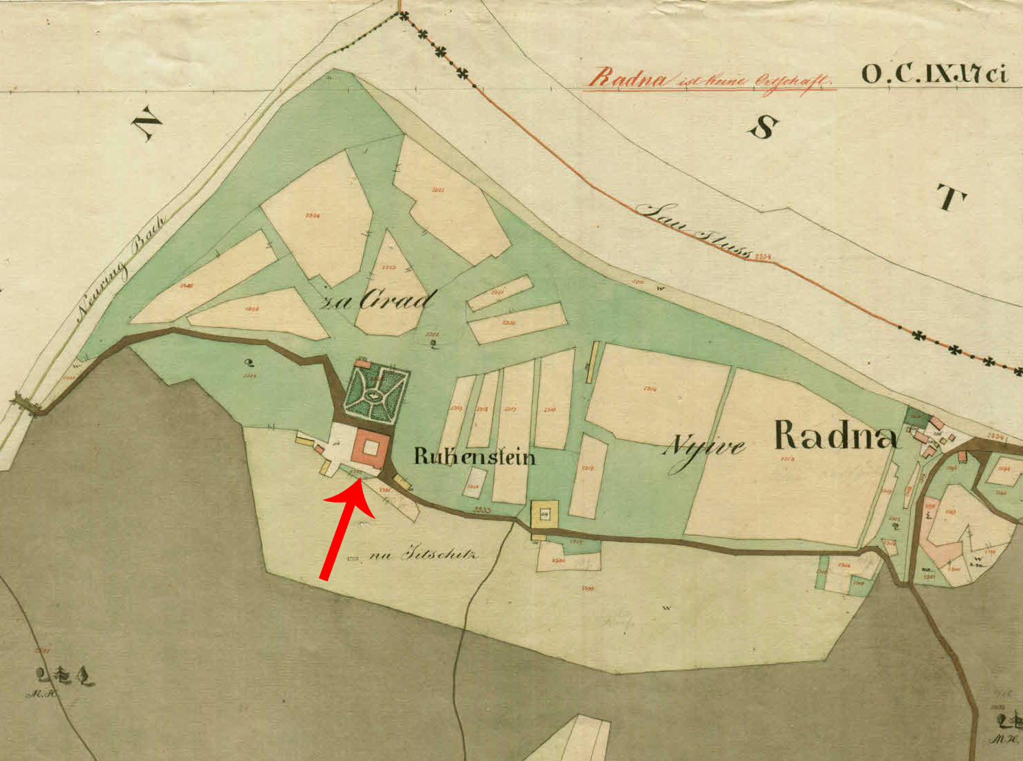 Franciscejski kataster za Kranjsko, 1823-1869